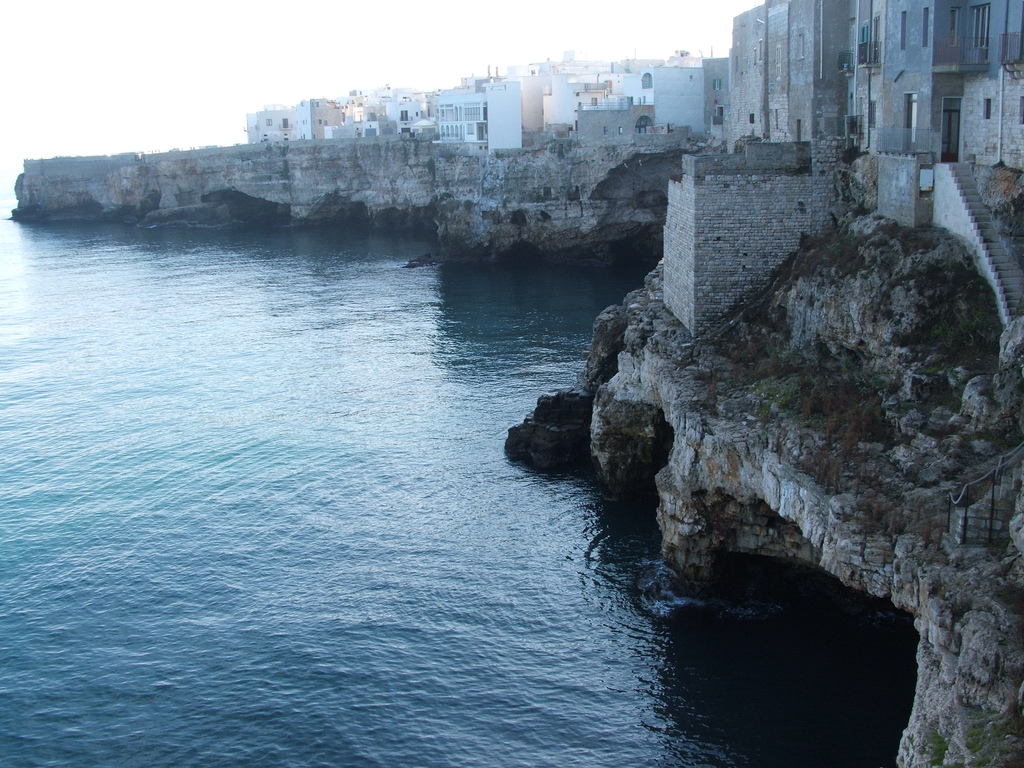 Polignano a Mare, Apulia, Italy